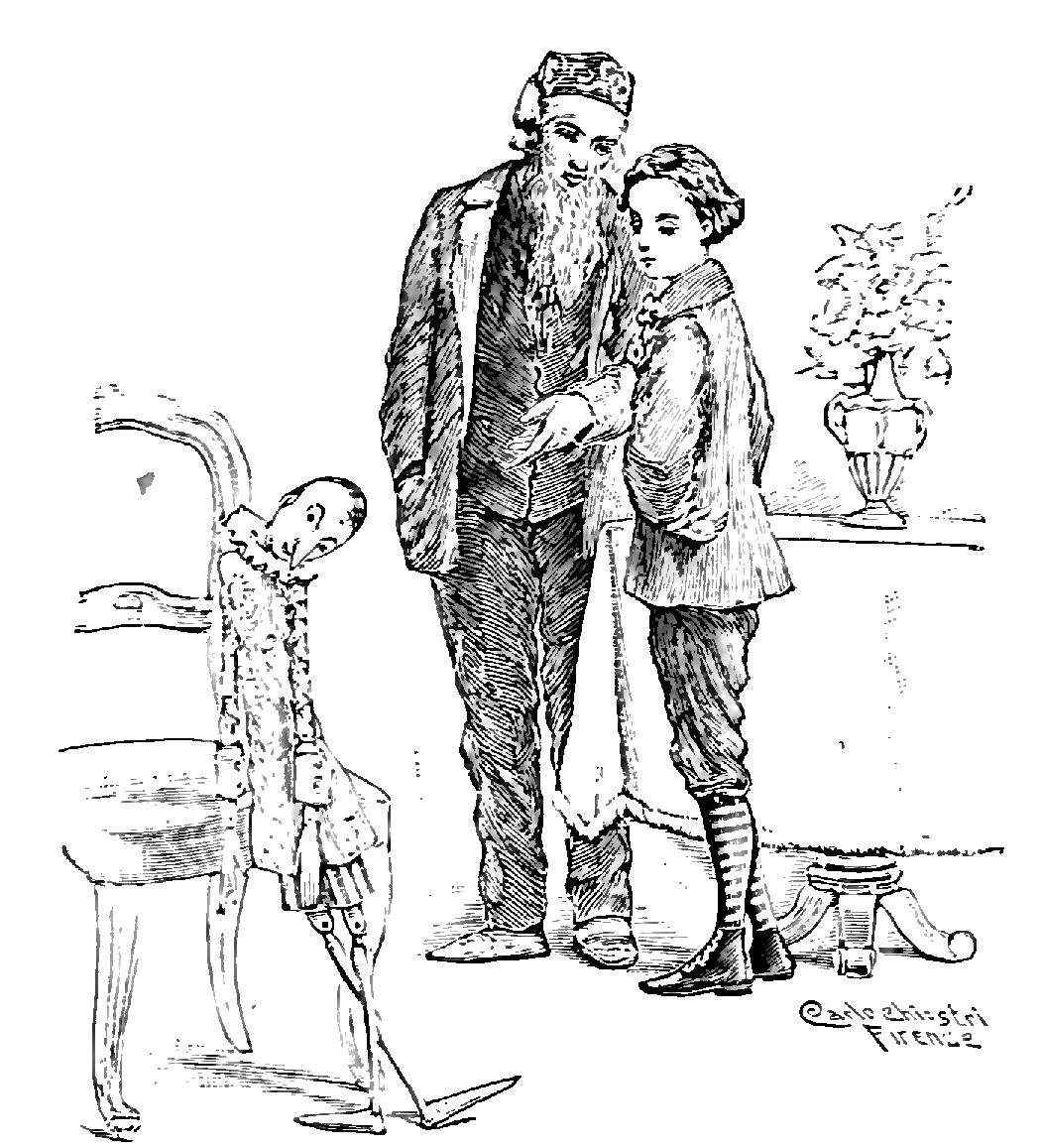 Illustrations from "Le avventure di Pinocchio, storia di un burattino", Carlo Collodi, Bemporad & figlio, Firenze 1902 (Drawings and engravings by Carlo Chiostri, and A. Bongini)